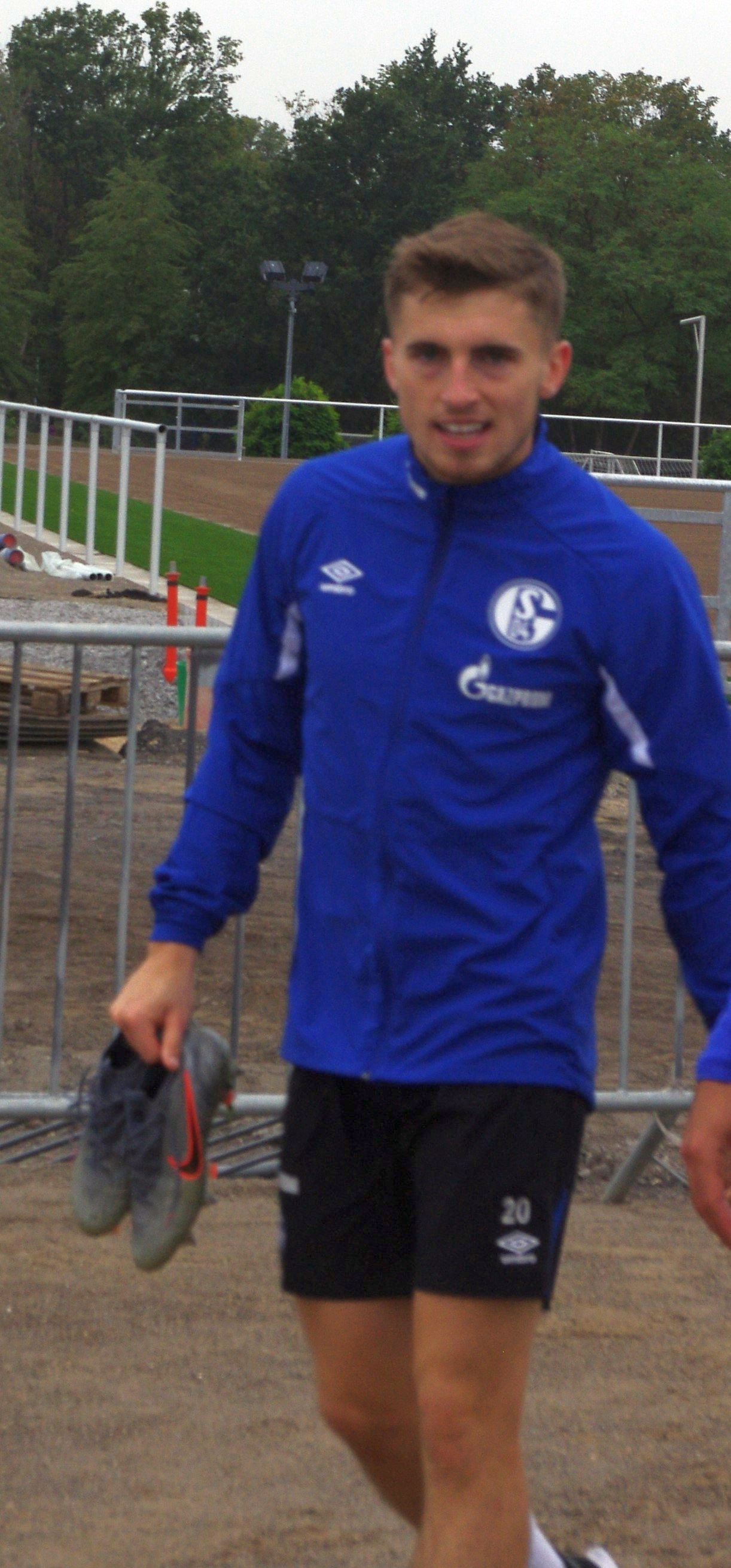 Jonjoe Kenny nach dem Schalke-Training am 11.09.2019